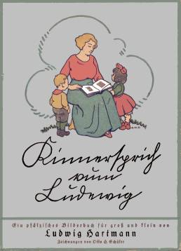 Pfälzer Gedichtband "Kinnersprich vum Ludewig", 1920